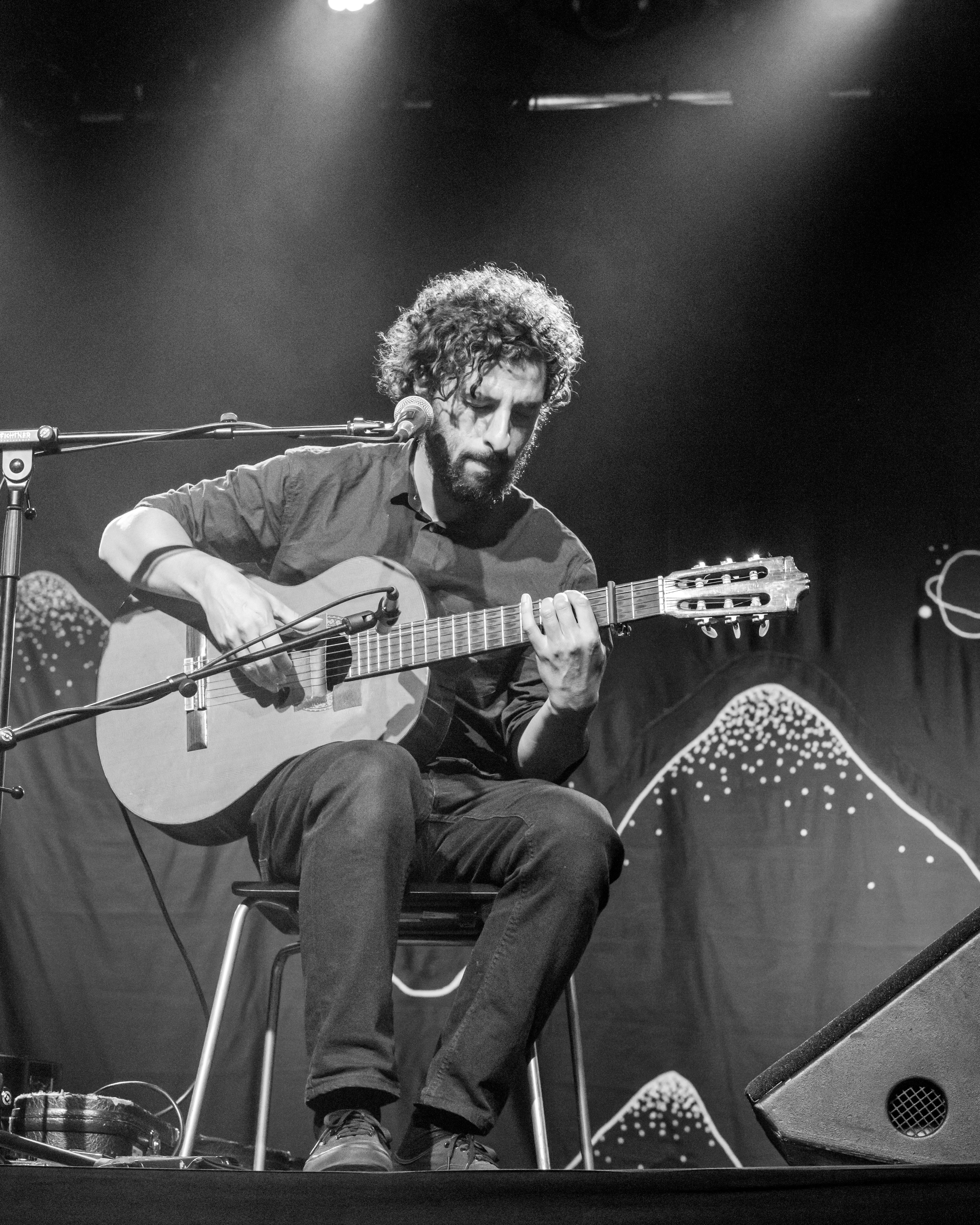 Bilder vom Zelt Musik Festival 2017 in Freiburg im Breisgau José González am 13.07.2017